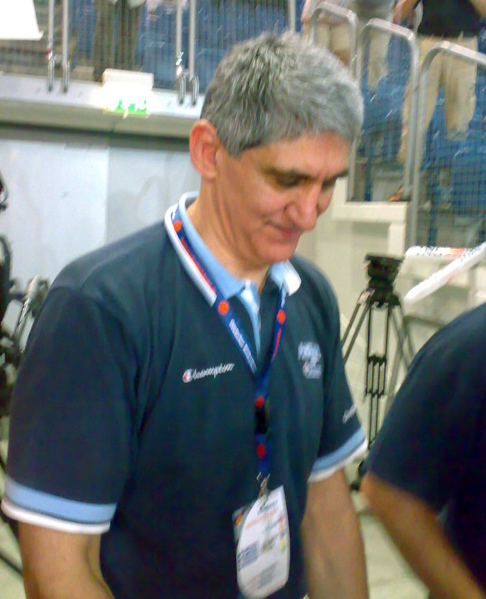 Panagiotis Giannakis, Trainer der griechischen Basketballnationalmannschaft